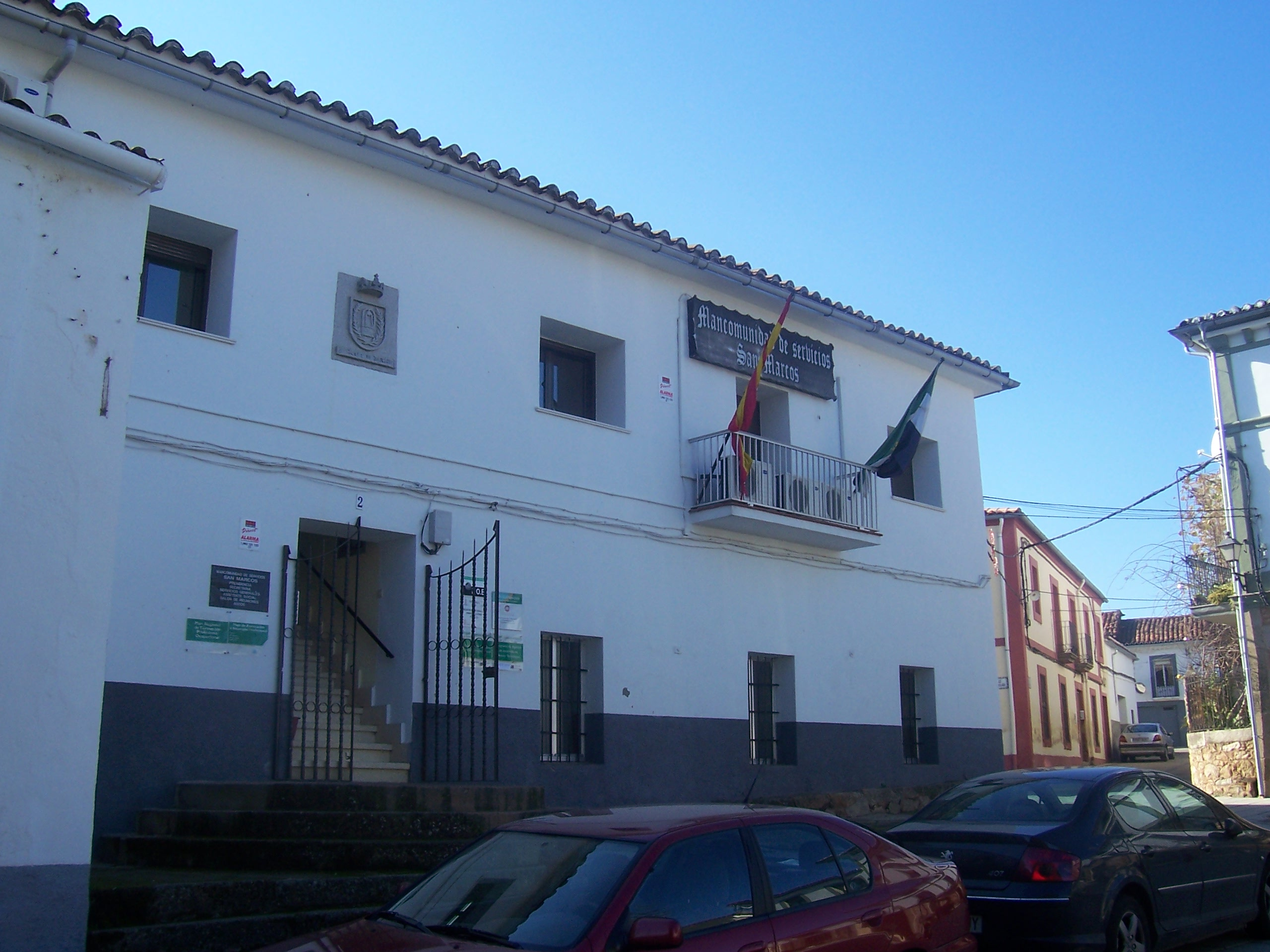 Sede de la Mancomunidad Integral Valle del Alagón, en Pozuelo de Zarzón, Cáceres, España